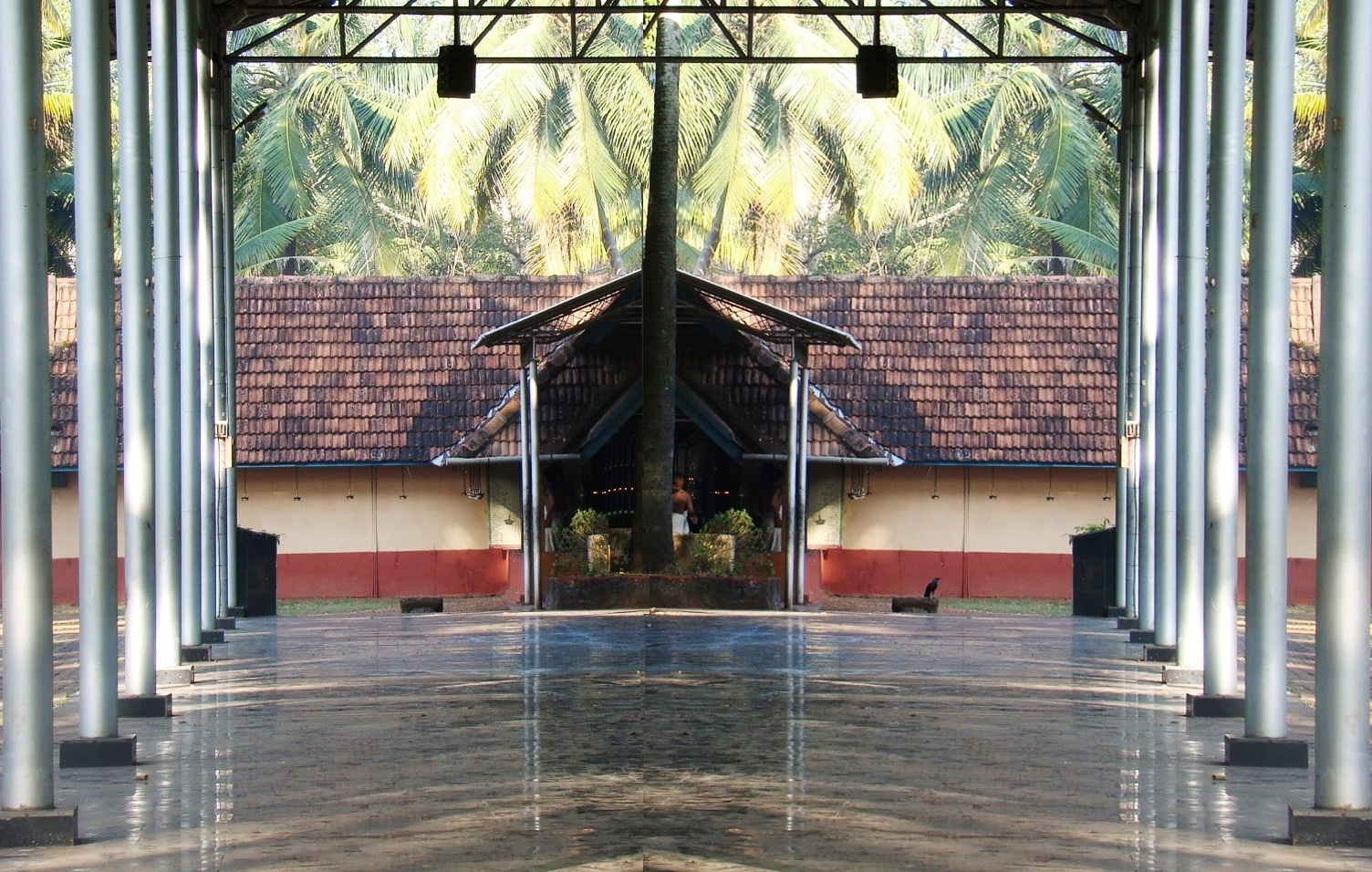 മോർക്കുളങ്ങര ക്ഷേത്രവും ആനക്കൊട്ടിലും